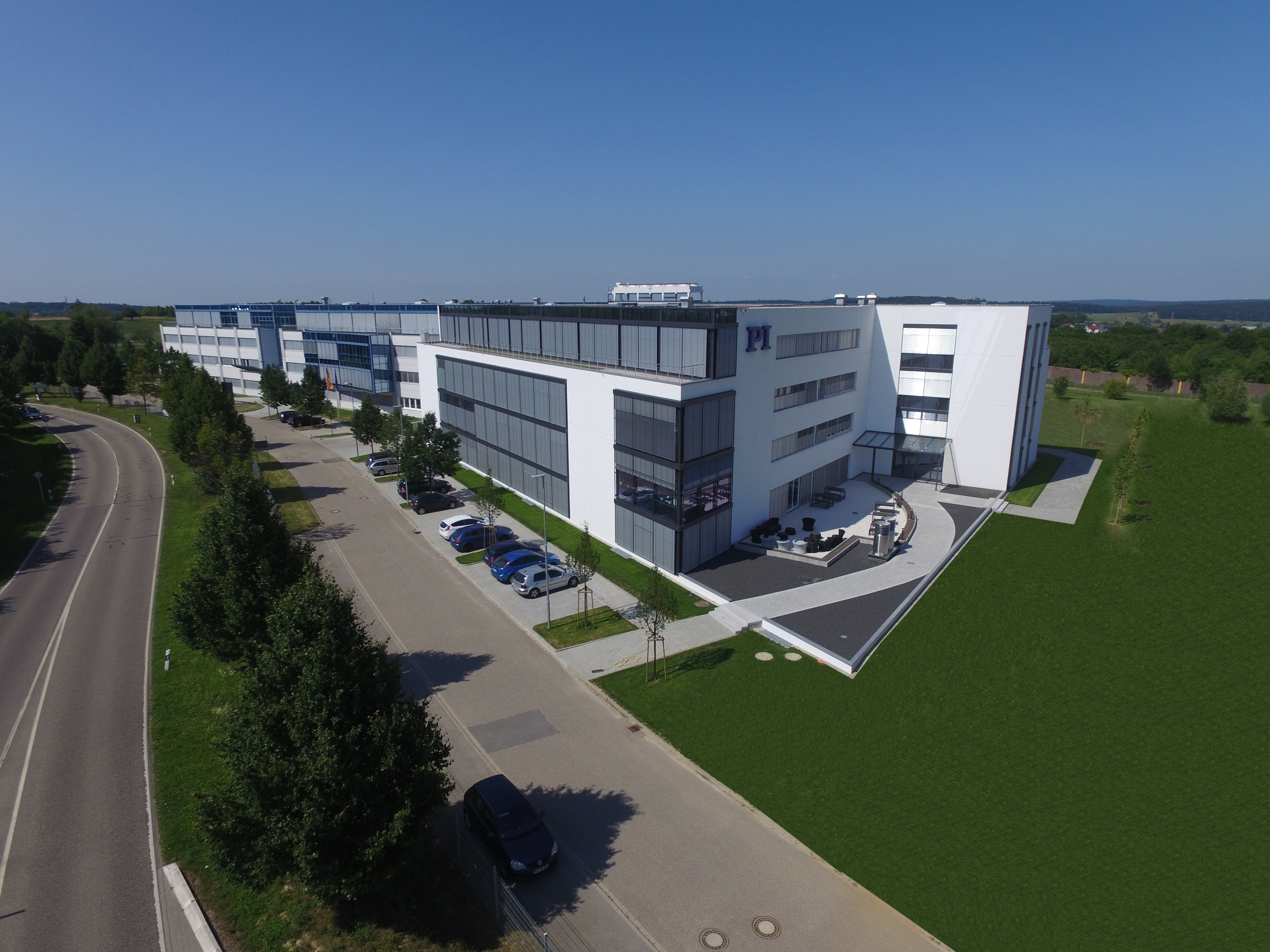 PI Karlsruhe Headquater Buildung